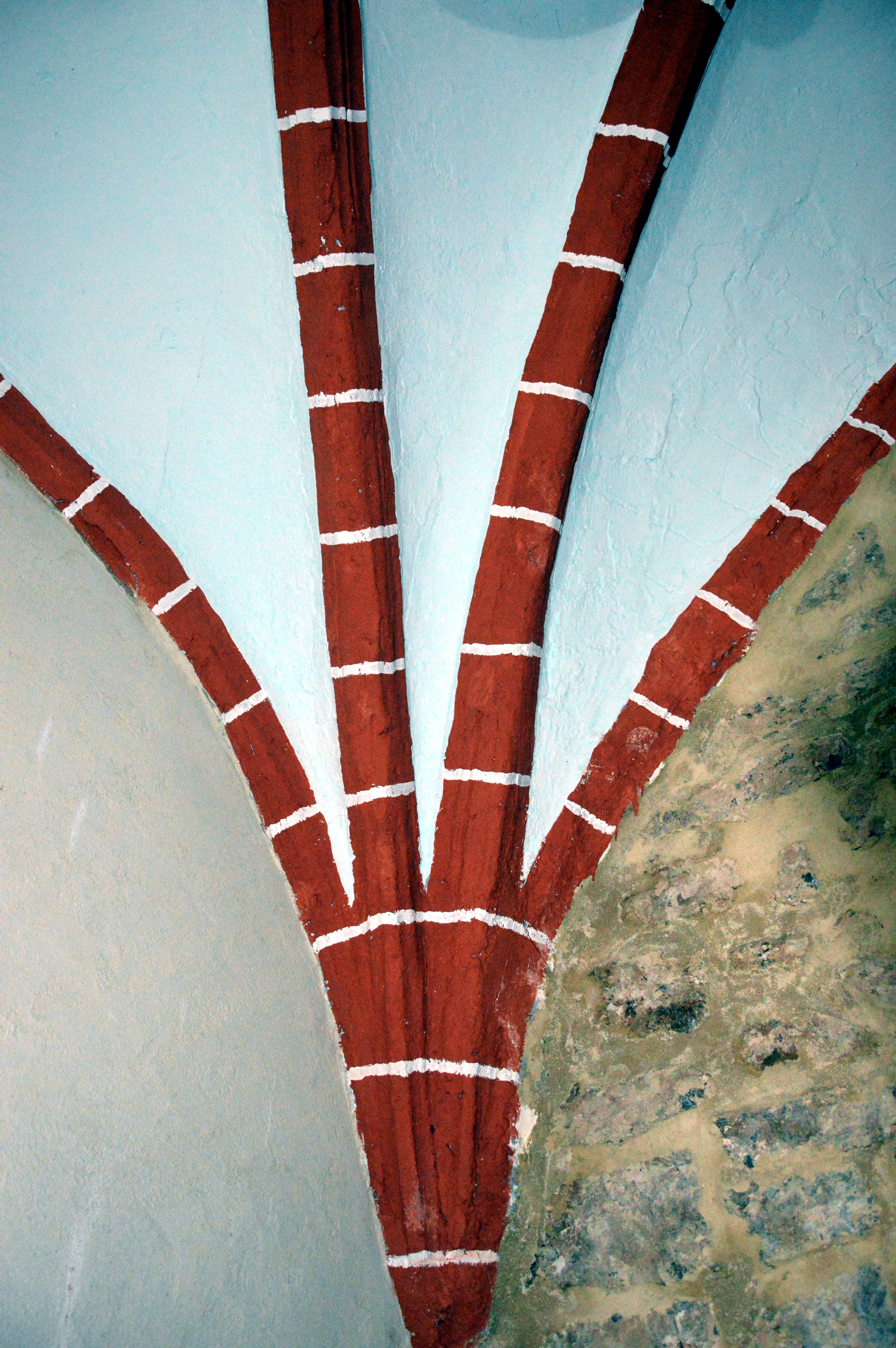 Detalle de ménsula y arranca de arcadas góticas en el Santuario de la Fuensanta en Villel (Teruel), 2019.